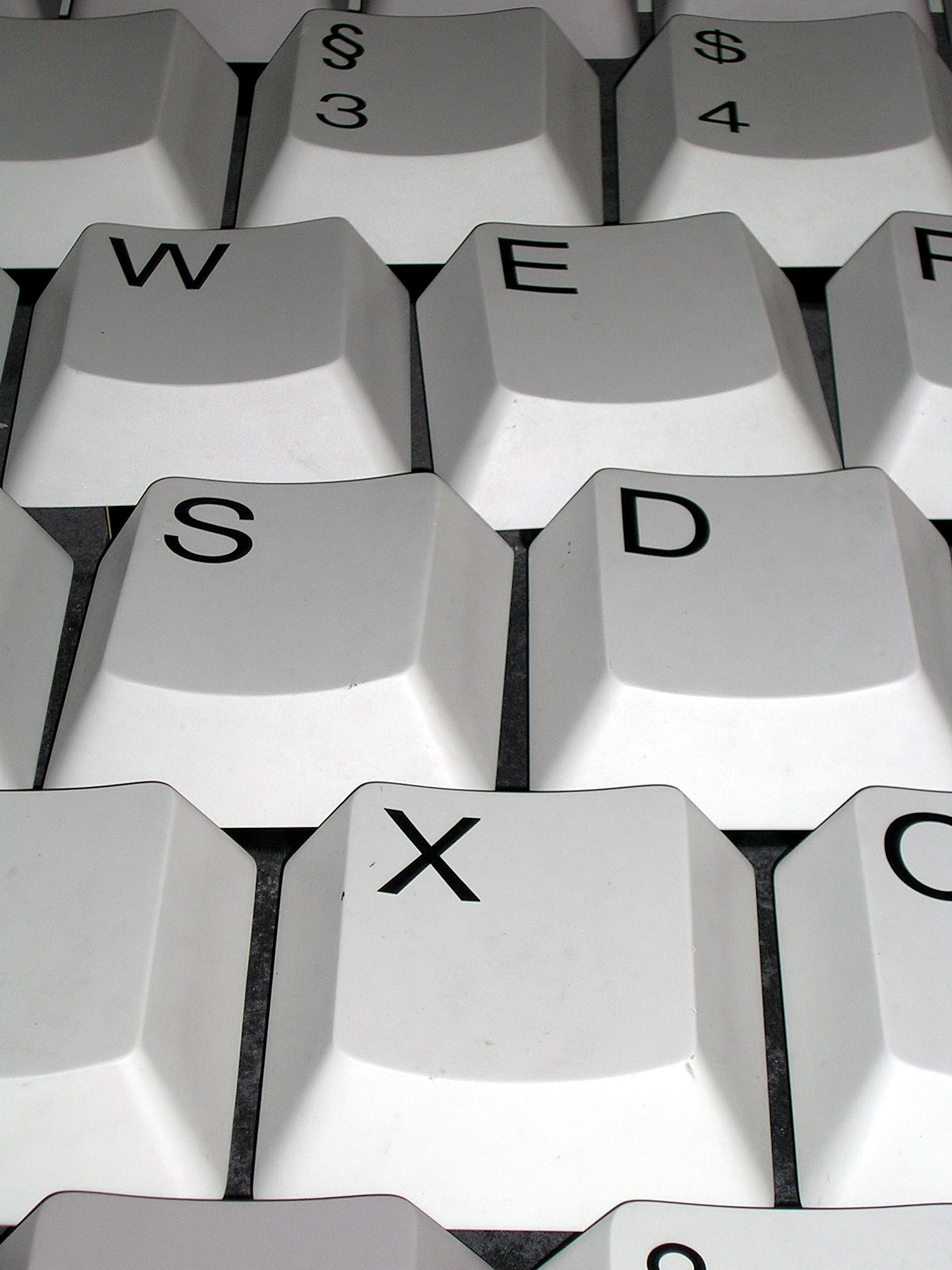 deutsche Tastatur Nahaufnahme